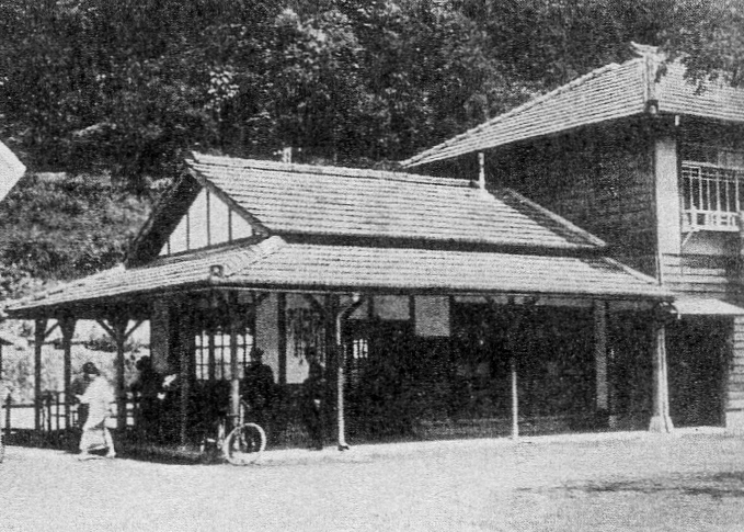 三信鉄道の起点三河川合駅（昭和12年）